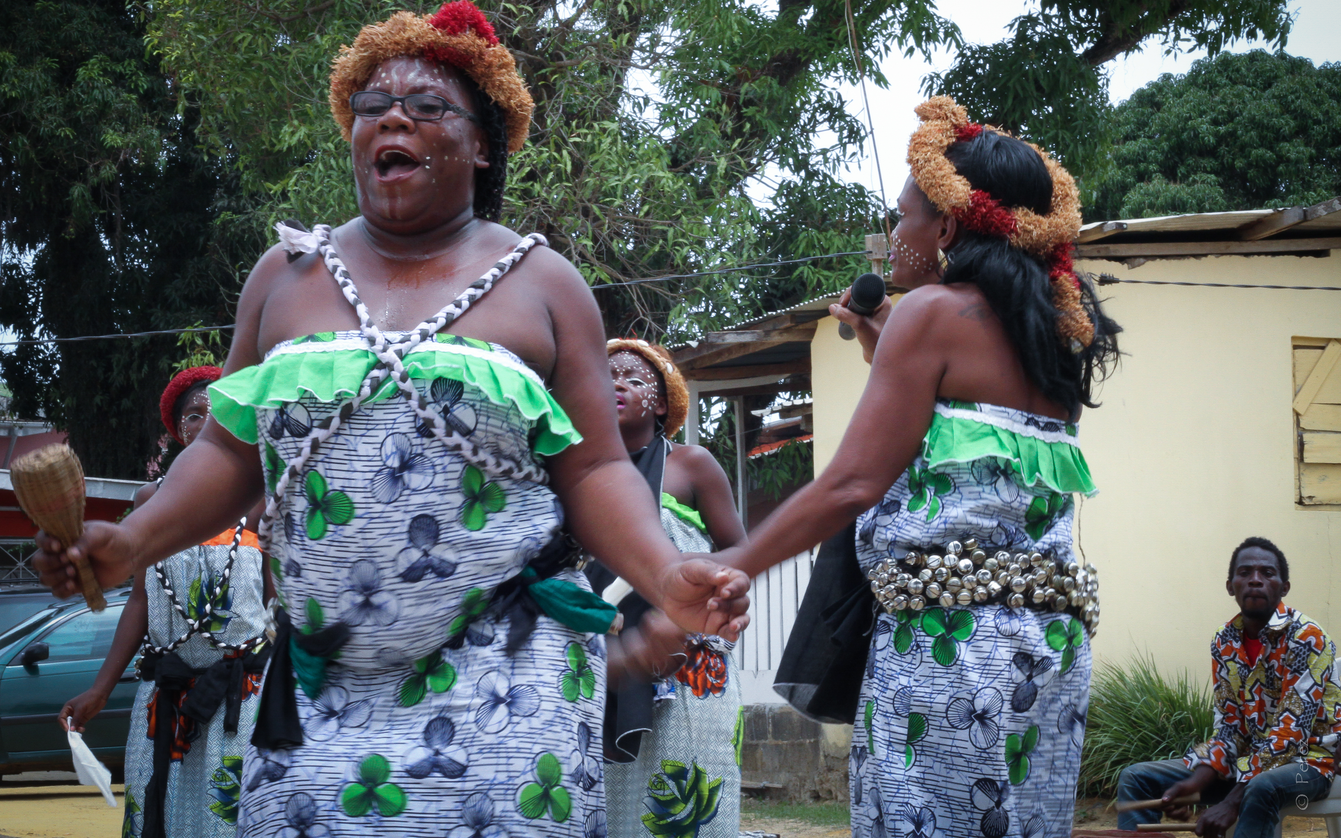 Troupe culturelle de danse patrimoniale de la Communauté MPONGWE(chefferie AGUNGU-Libreville-GABON)